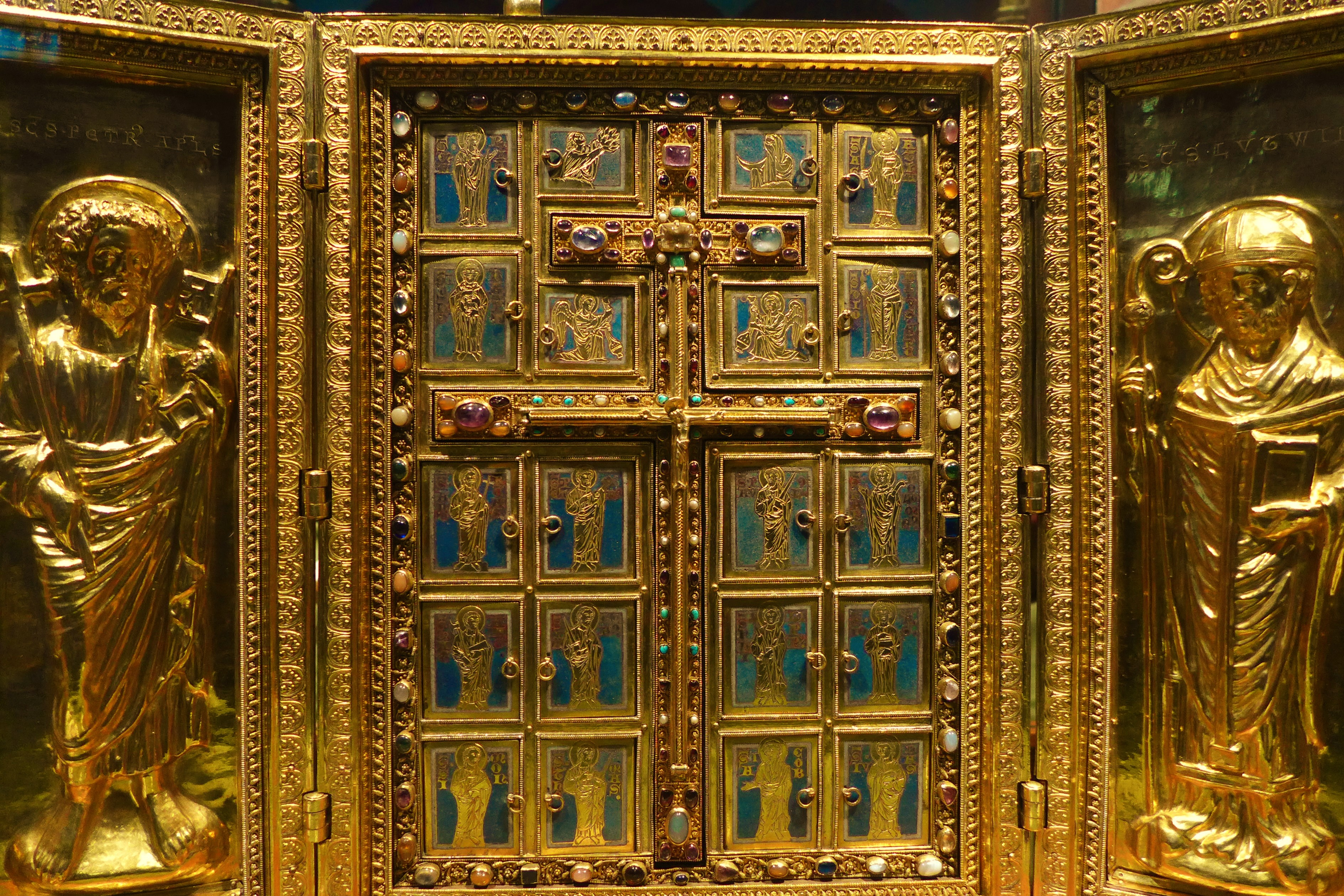 St. Luitwin (Mettlach), Staurothek aus dem Jahr 1228